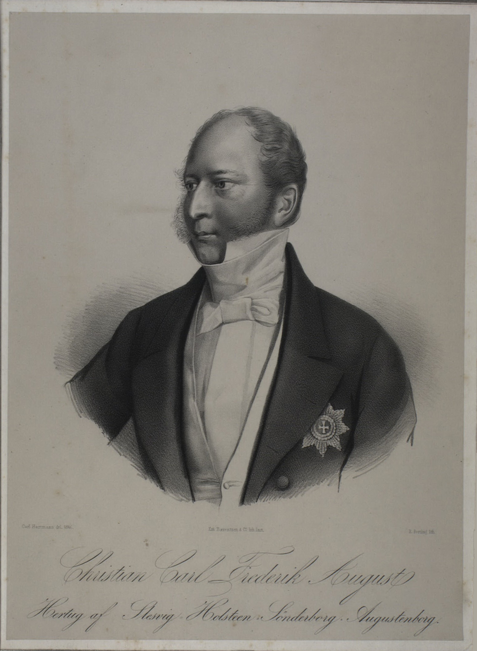 Christian August af Augustenborg (1798-1869).